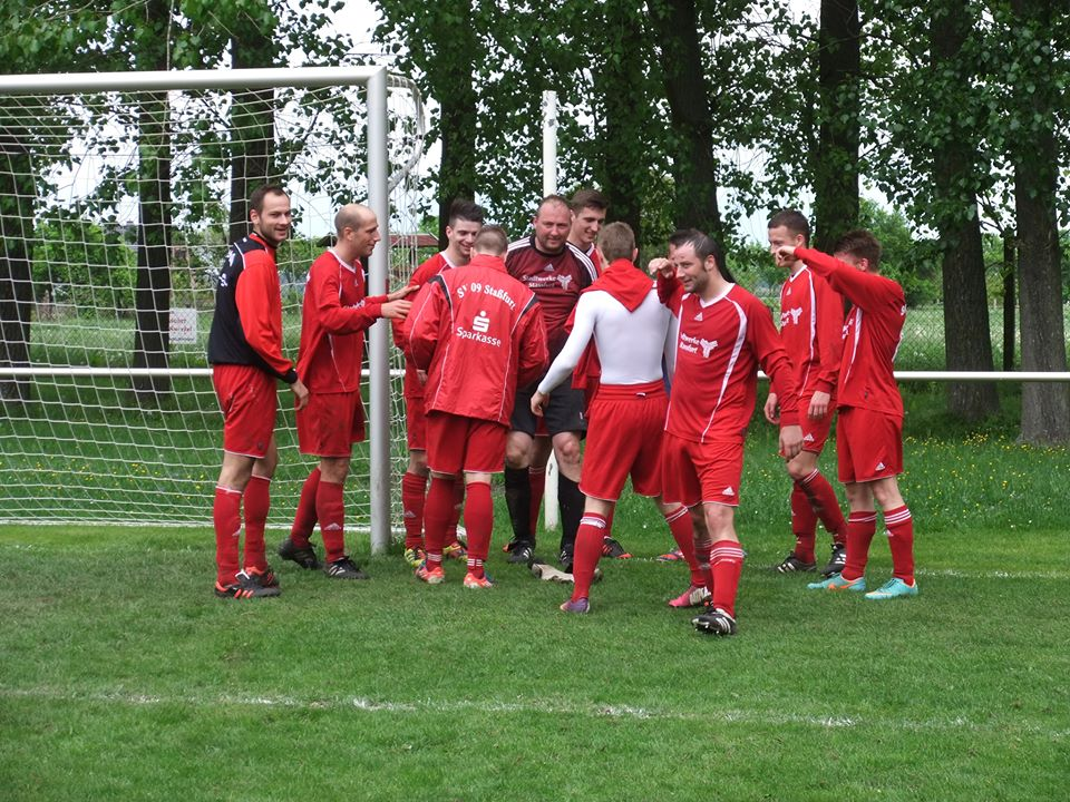 Schlussszene des Spiels Möringer SV gegen den SV 09 Staßfurt am 20.05.2013